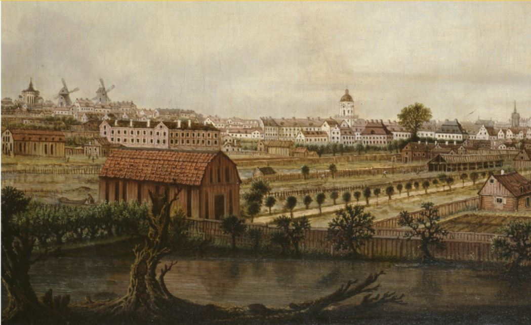 Utsikt från Blekholmen mot trakten mellan Observatoriet och Kungsholmsbrogatan. Beskuren blid av Johan Sevenbom oljemålning